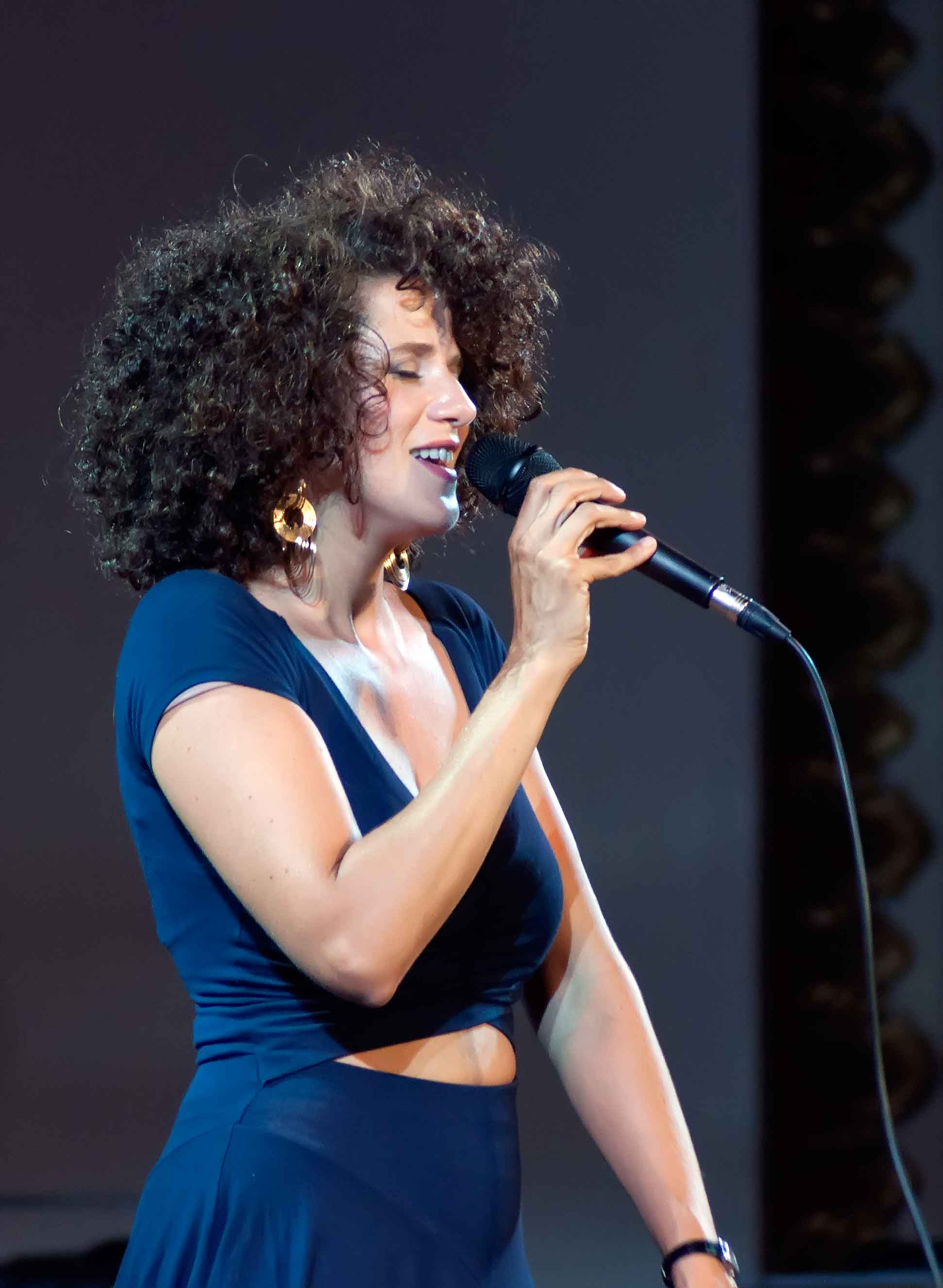 Sochi Jazz Fest 2018